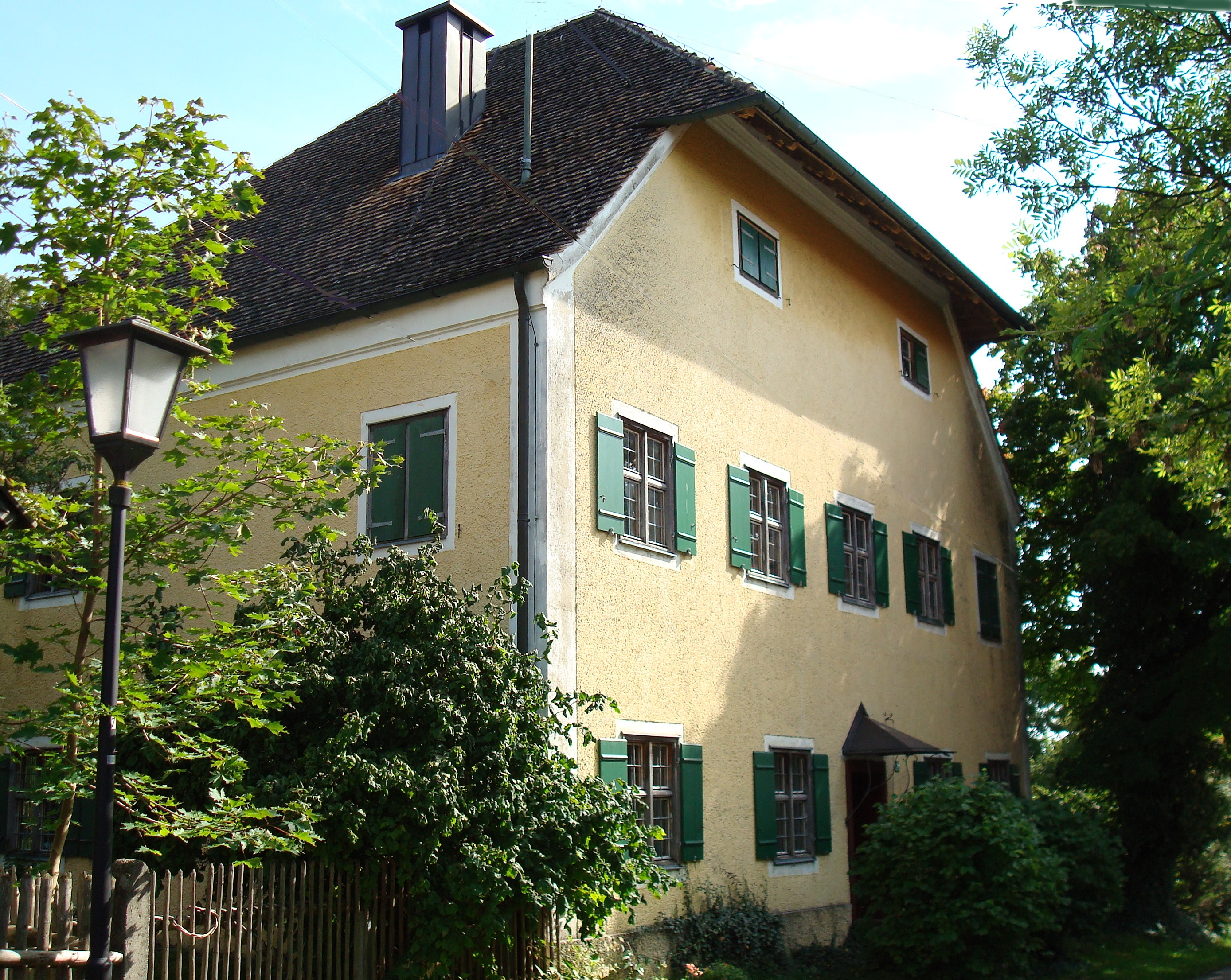 Andechs, Ortsteil Machtlfing, Kirchenweg 4. Ehemaliger Pfarrhof, zweigeschossiger Bau mit überstehendem Halbwalm aus dem 18. Jahrhundert.This is a photograph of an architectural monument.